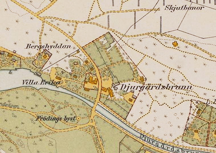 Del av 1934 års karta över Stockholm med omgivningar visande Djurgårdsbrunn